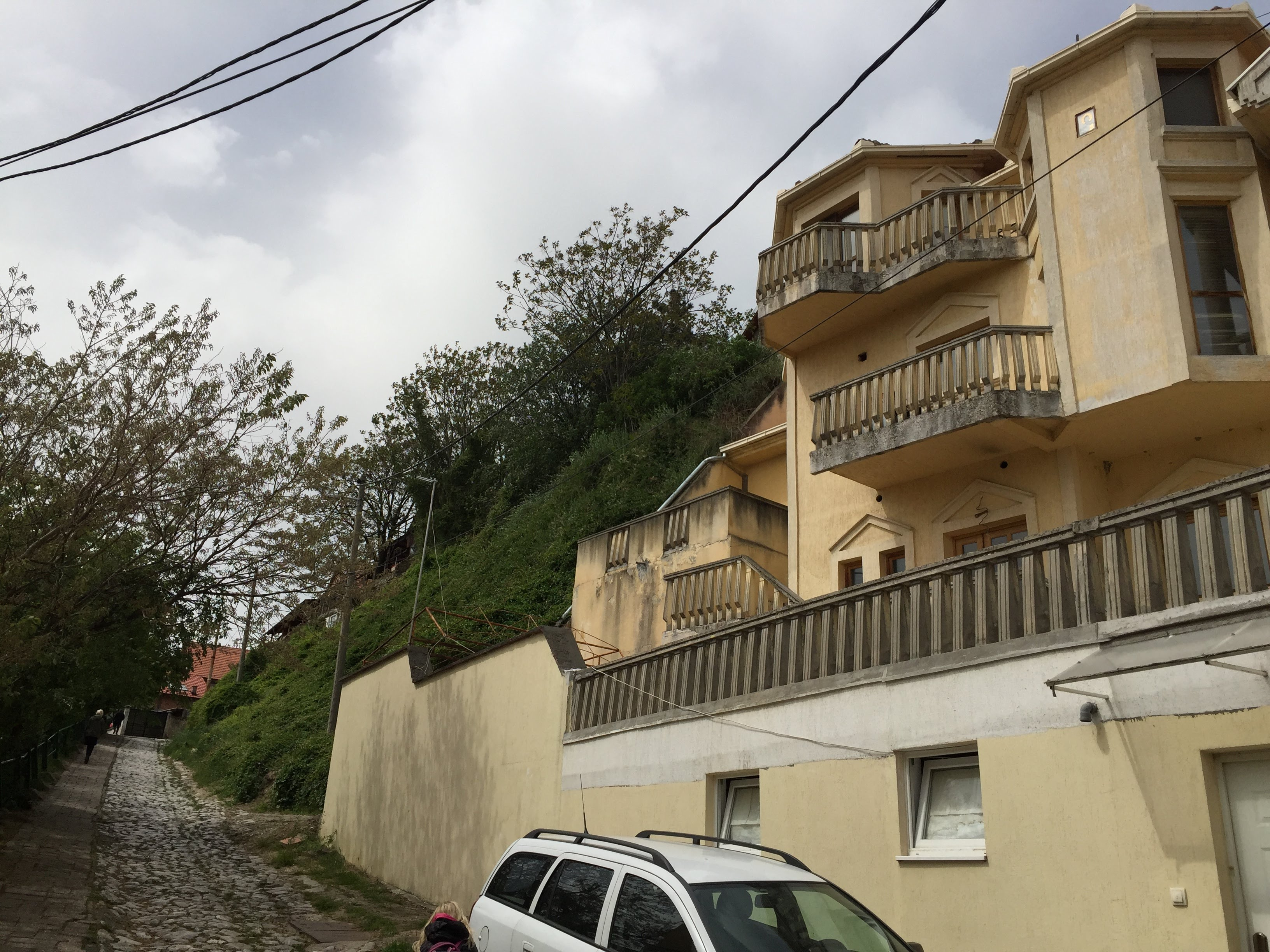 Lesni breg Ćukovac. Zemun, Beograd